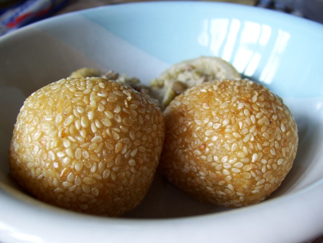 Onde-onde